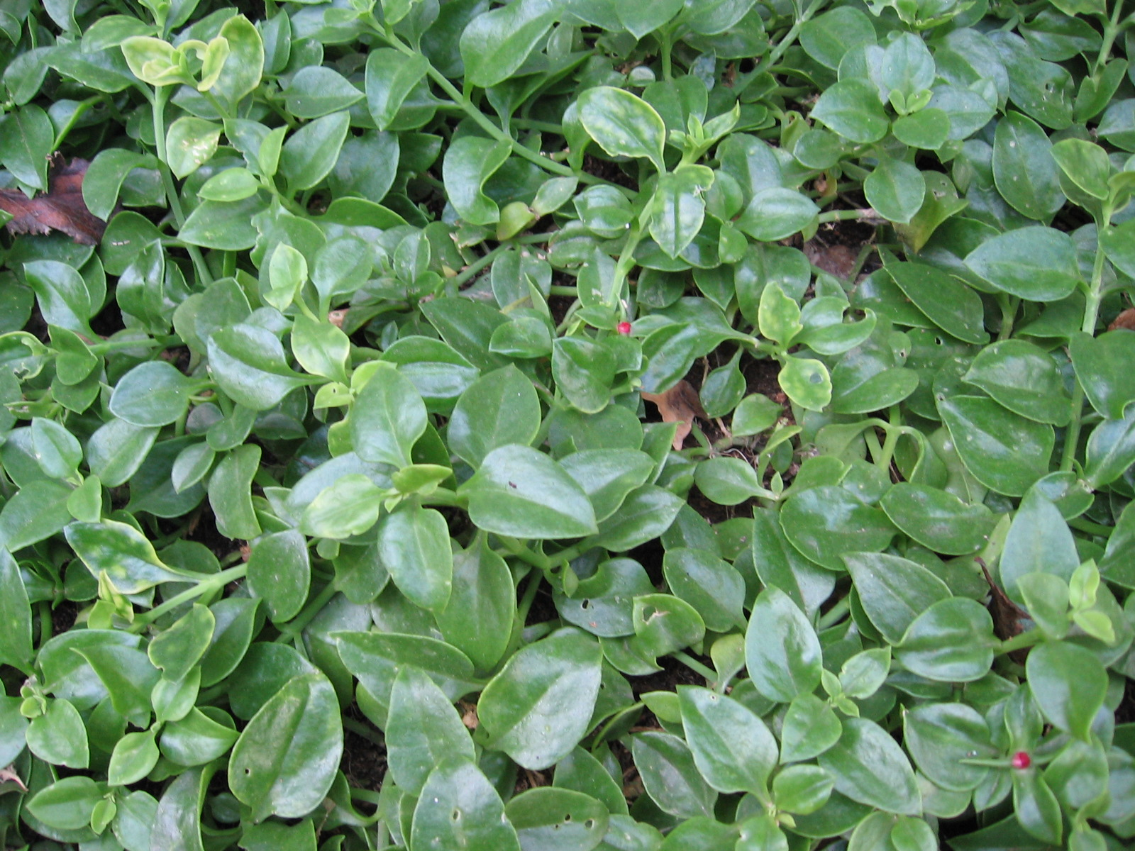 Aptenia cordifolia